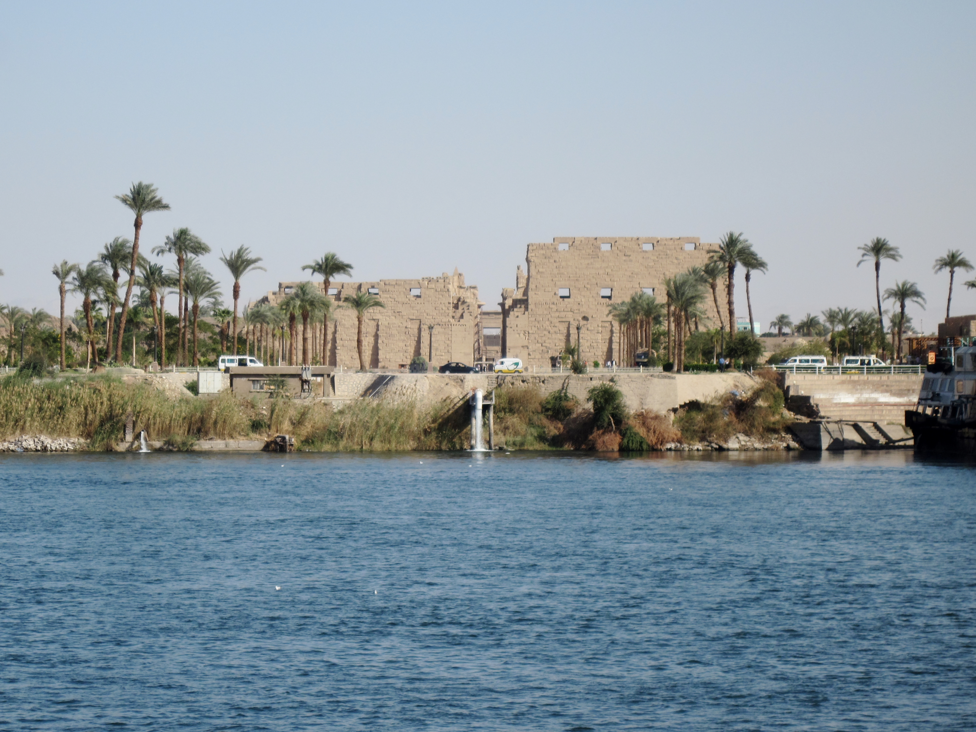 Erster Pylon des Tempels von Karnak, nördlich von Luxor, Ägypten